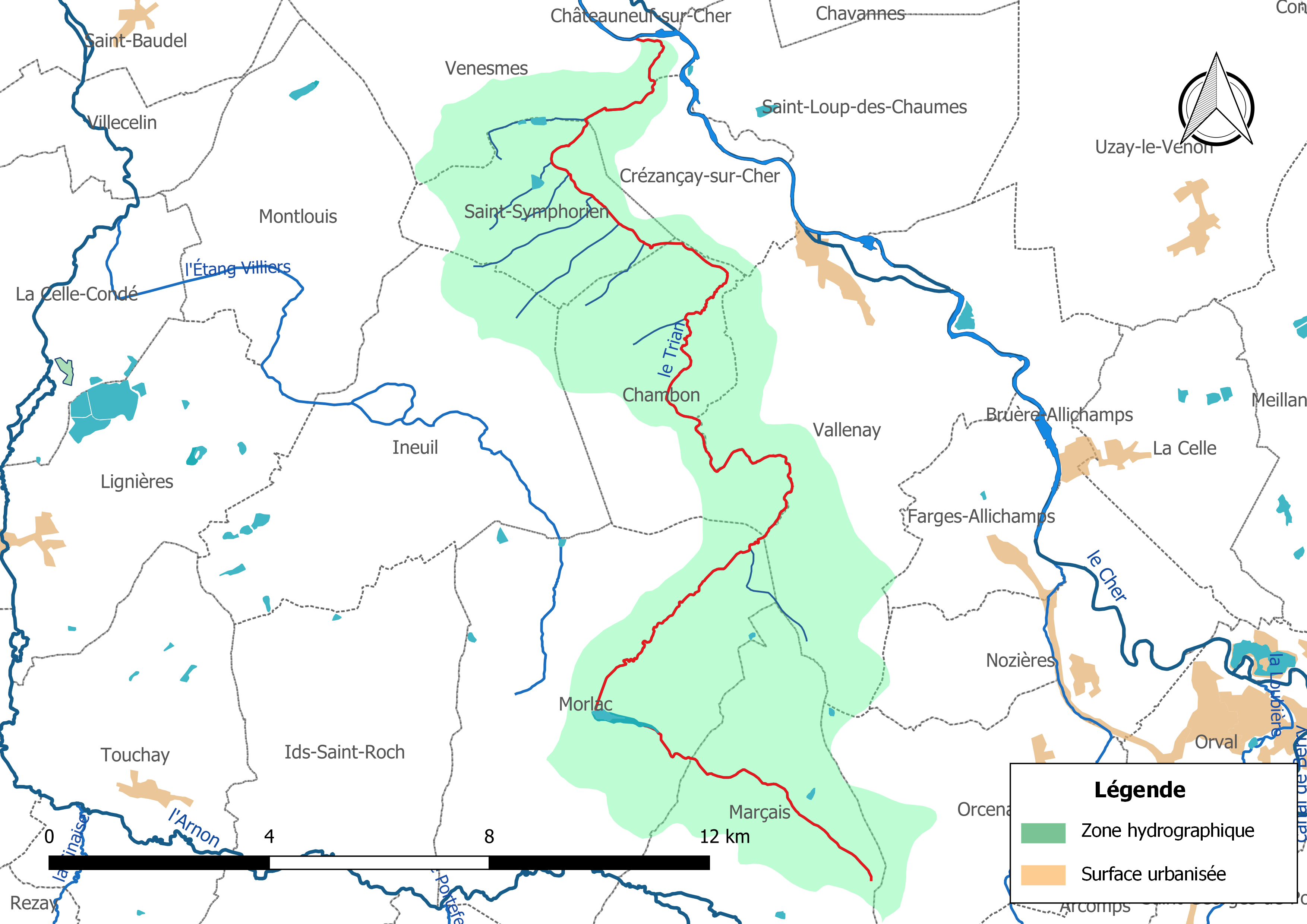 Carte du cours d'eau « le Trian » (France) et de la zone hydrographique dans laquelle il s'insère.